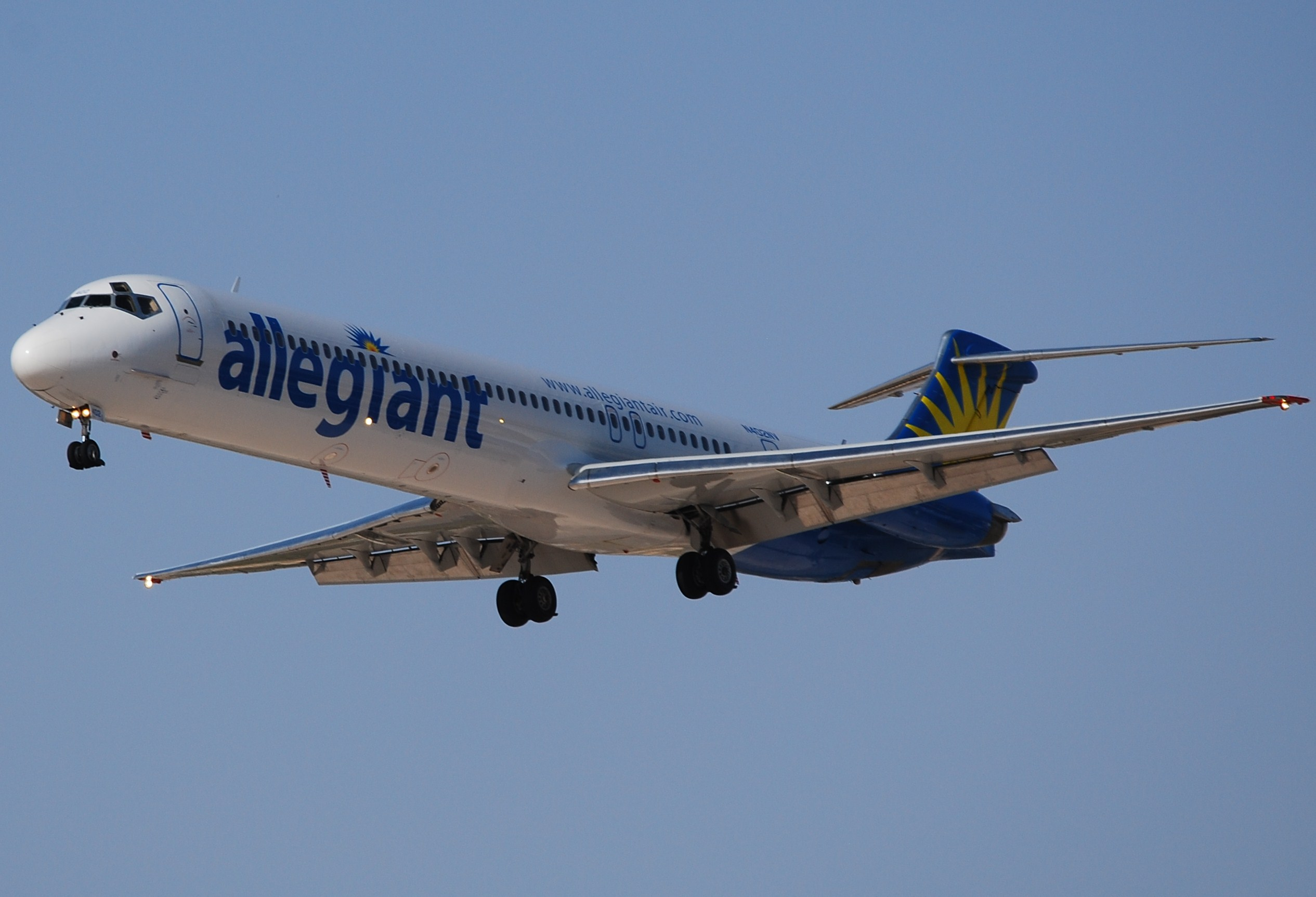 ALLEGIANT AIR